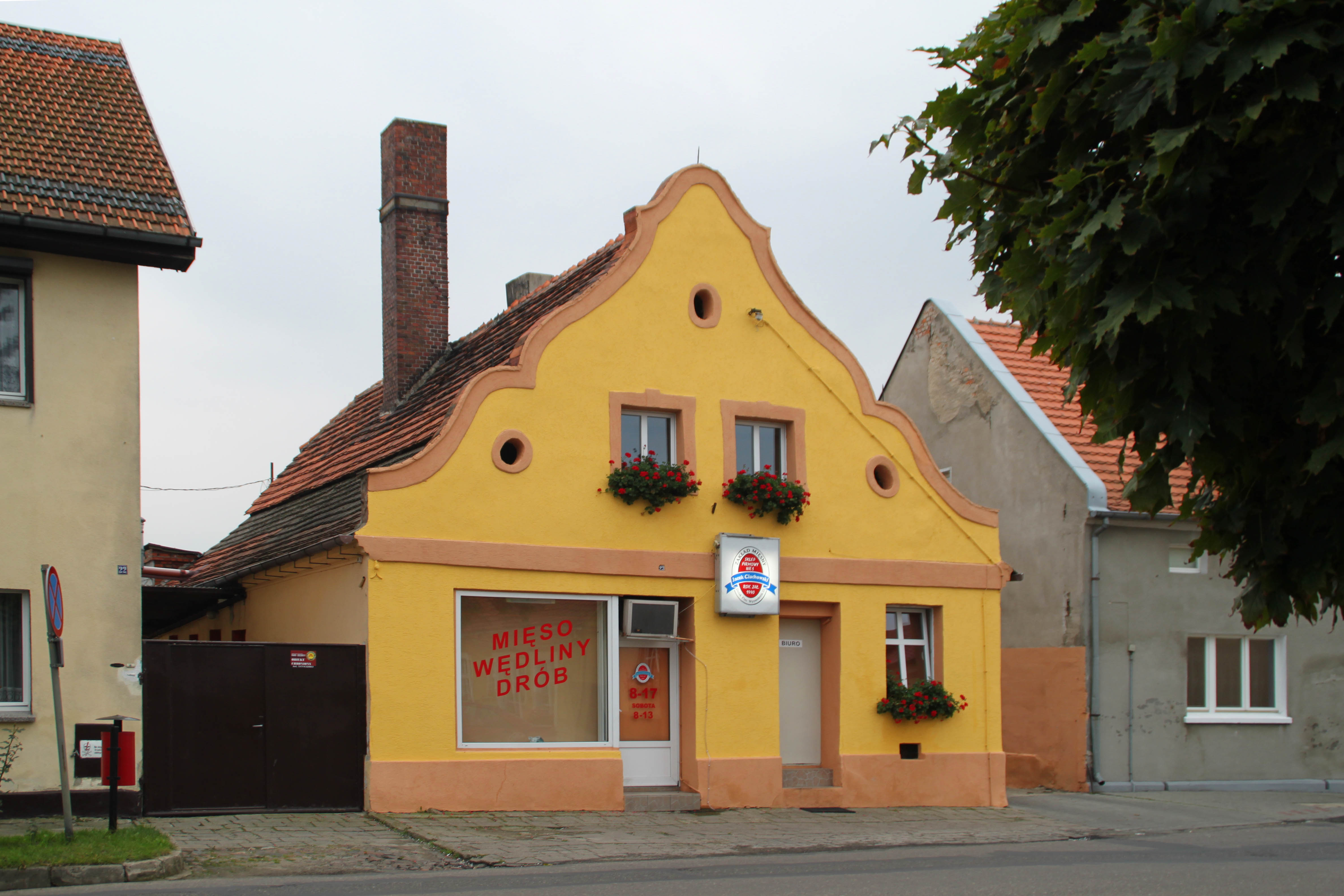 Dolsk, Rynek 23. Dom z początku XIX w.